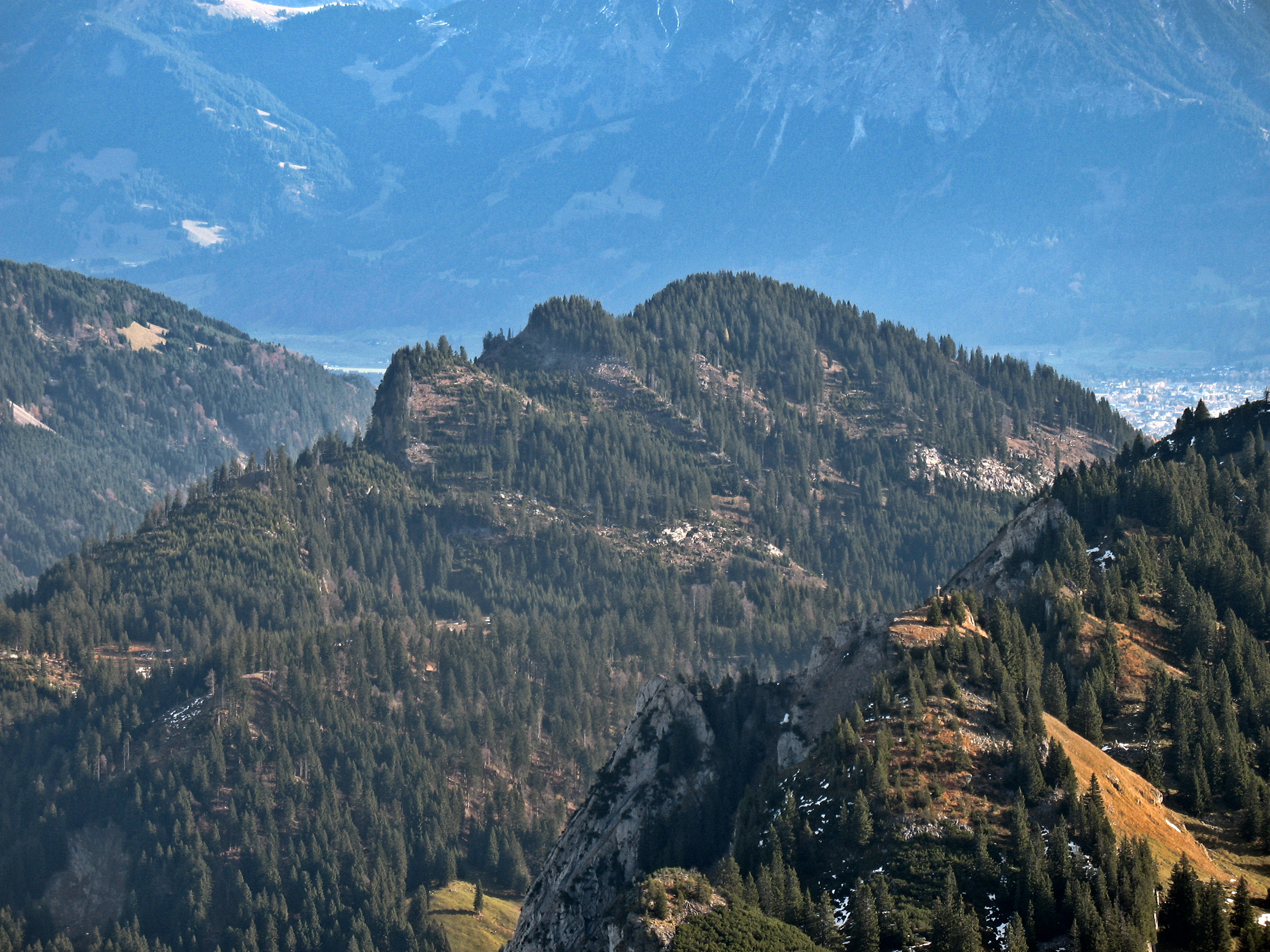 Blick von den Unteren Gottesackerwänden (1858 m) nach Nordosten zu den Kackenköpfen (1560 m).